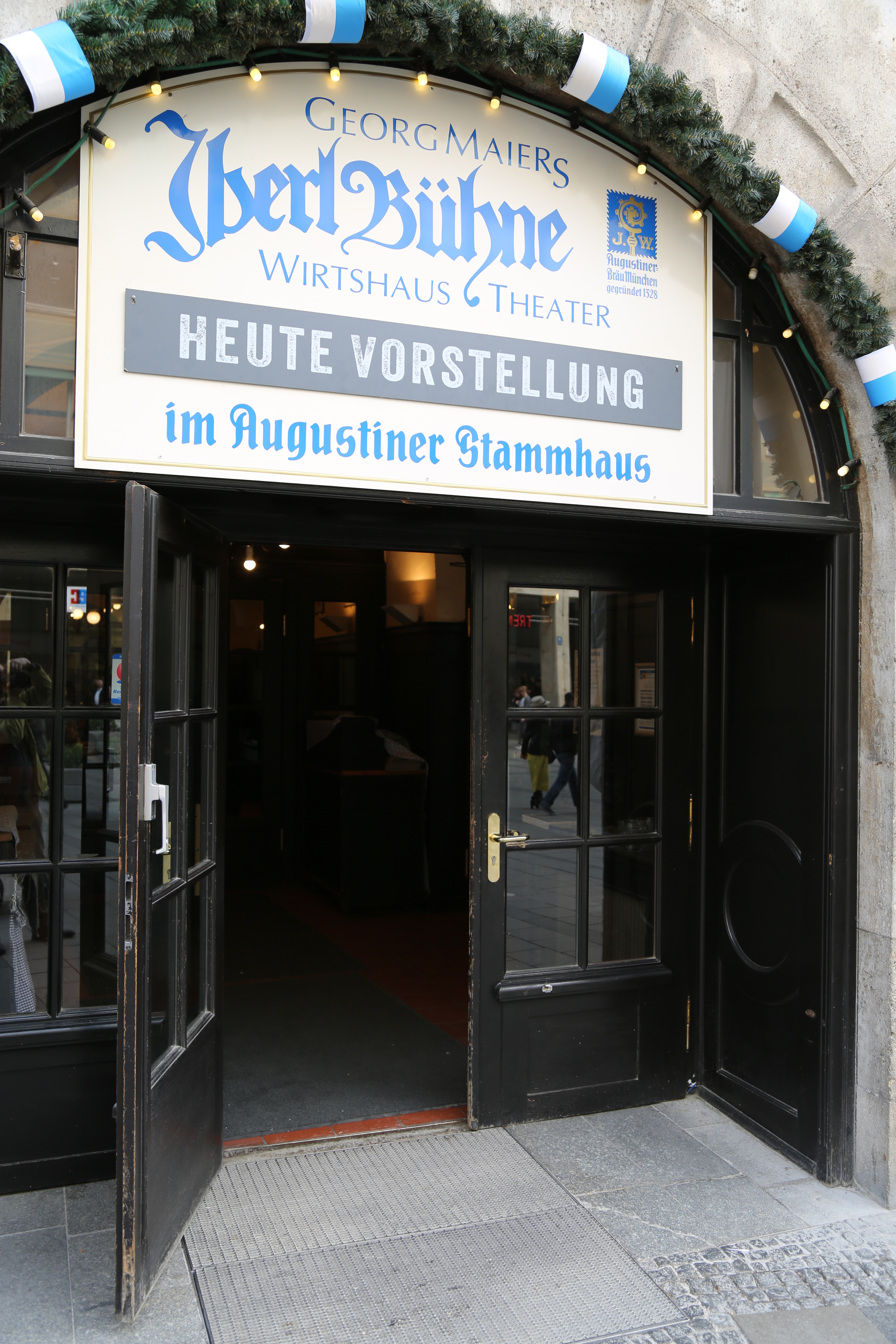 Augustiner-Stammhaus in der Münchner Neuhauser Straße. Eingang zum Theater der Iberl-Bühne